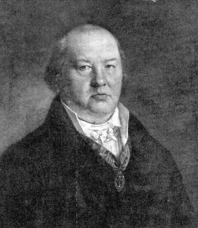 Pehr Dubb (1750–1834). Gråsprängt hår, vit väst, svart rock, vasaorden i band om halsen, gulbrun fondton.